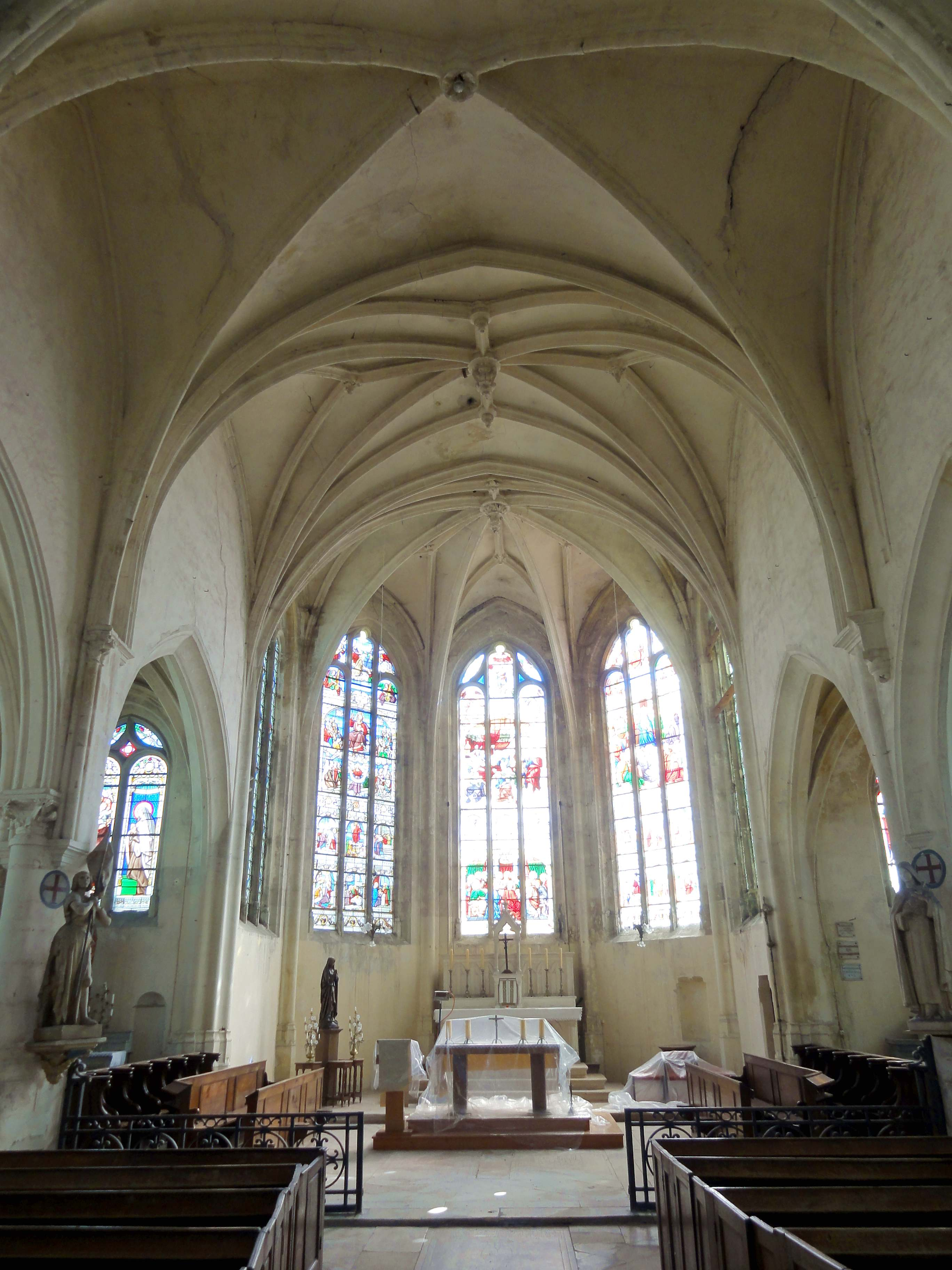 Intérieur de l'église (voir titre).